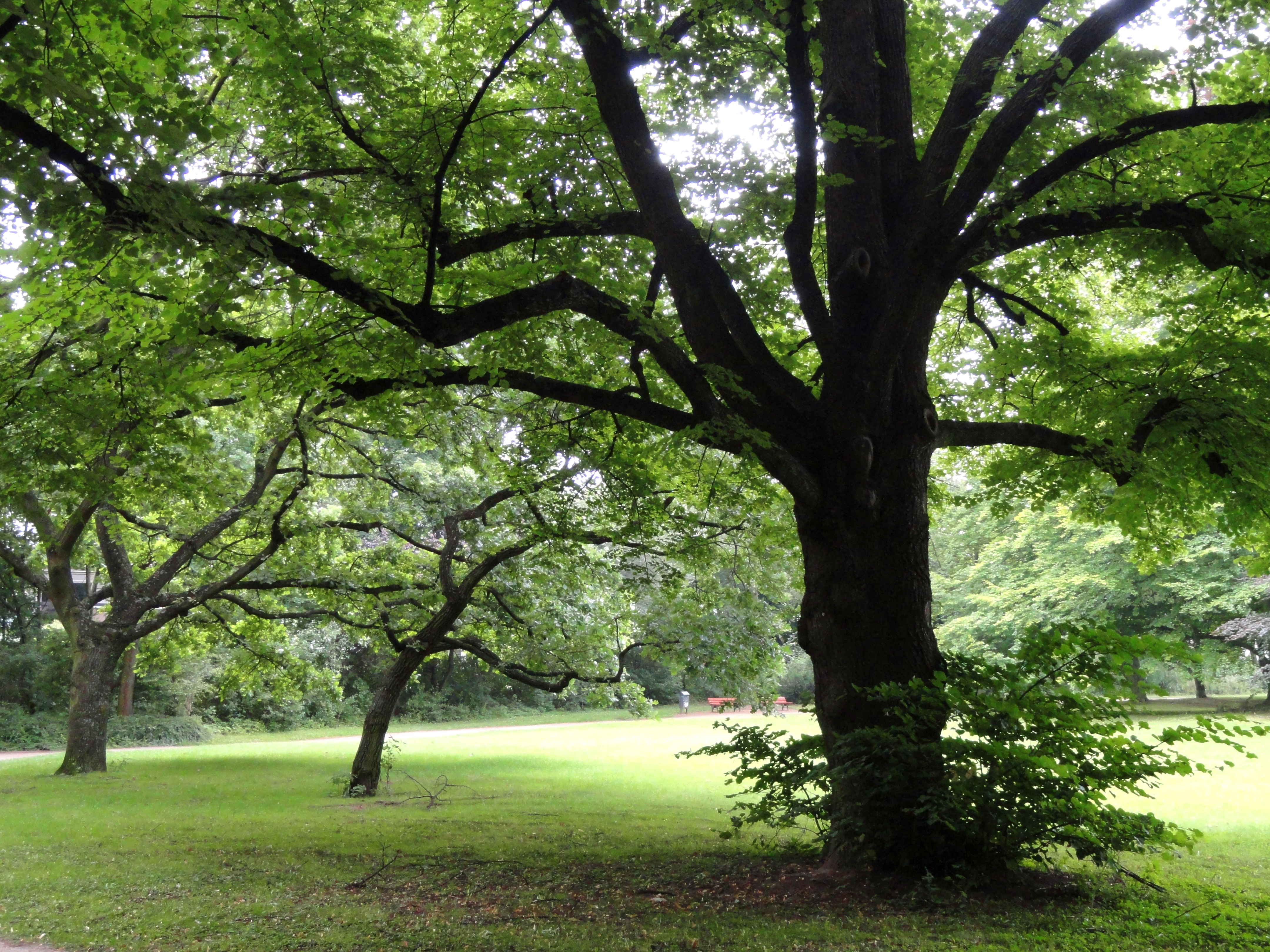 Grüneburgpark, Frankfurt am Main, Germany.